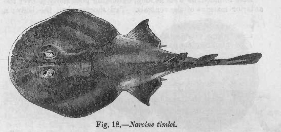 Narcine timlei (Bloch & Schneider, 1801)